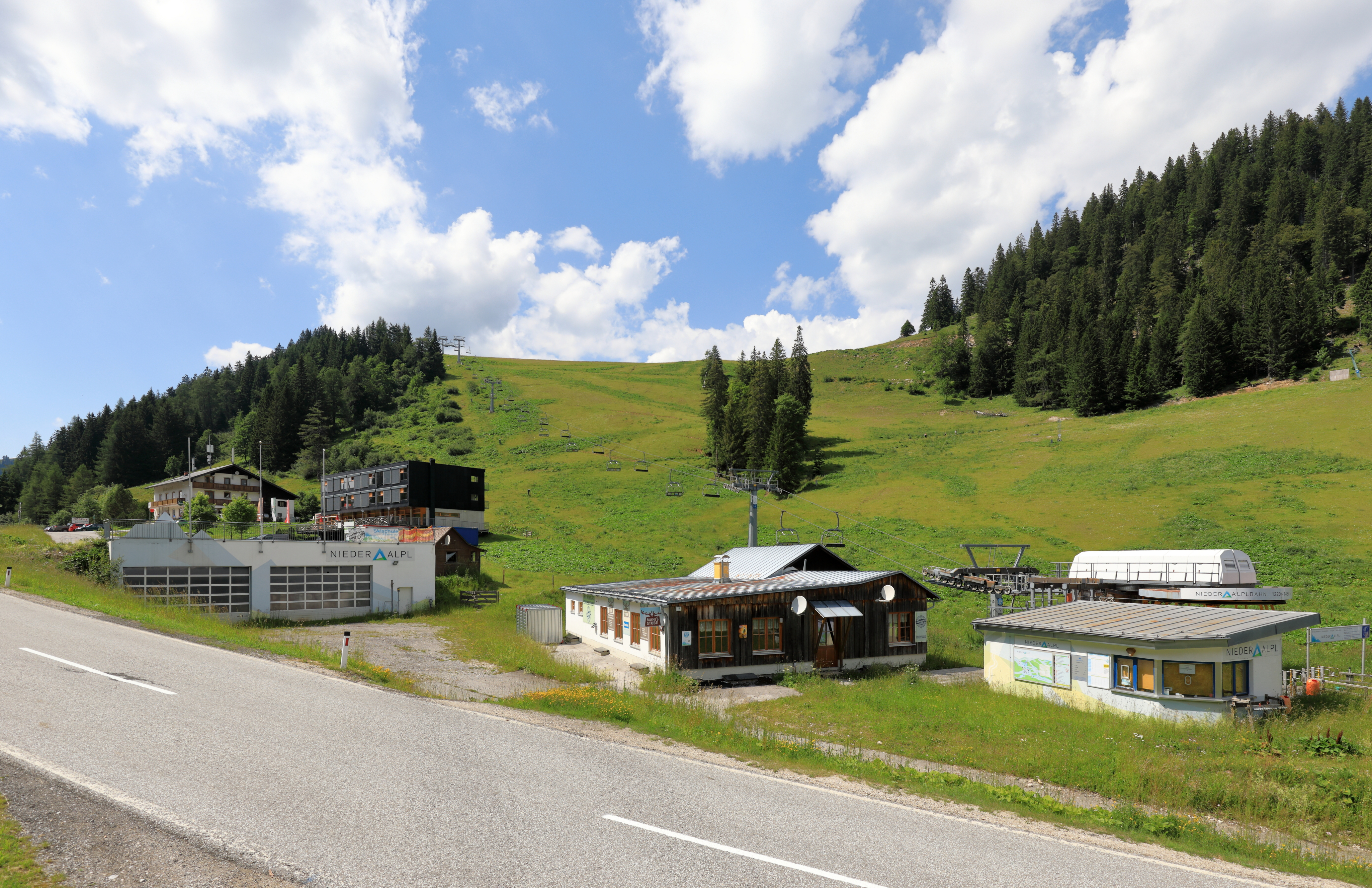 Die Passhöhe Niederalpl in den Mürzsteger Alpen mit Blickrichtung Westen.Direkt auf der 1221 m hohen Passhöhe verläuft die Gemeindegrenze von Mariazell und Neuberg an der Mürz. Die Passstraße (Niederalplstraße) mit den Talorten Wegscheid im Westen und Mürzsteg im Osten verbindet das Mürztal und das Salzatal. Auf der Passhöhe befindet sich ein Schigebiet mit ein paar kleineren Schiliften.